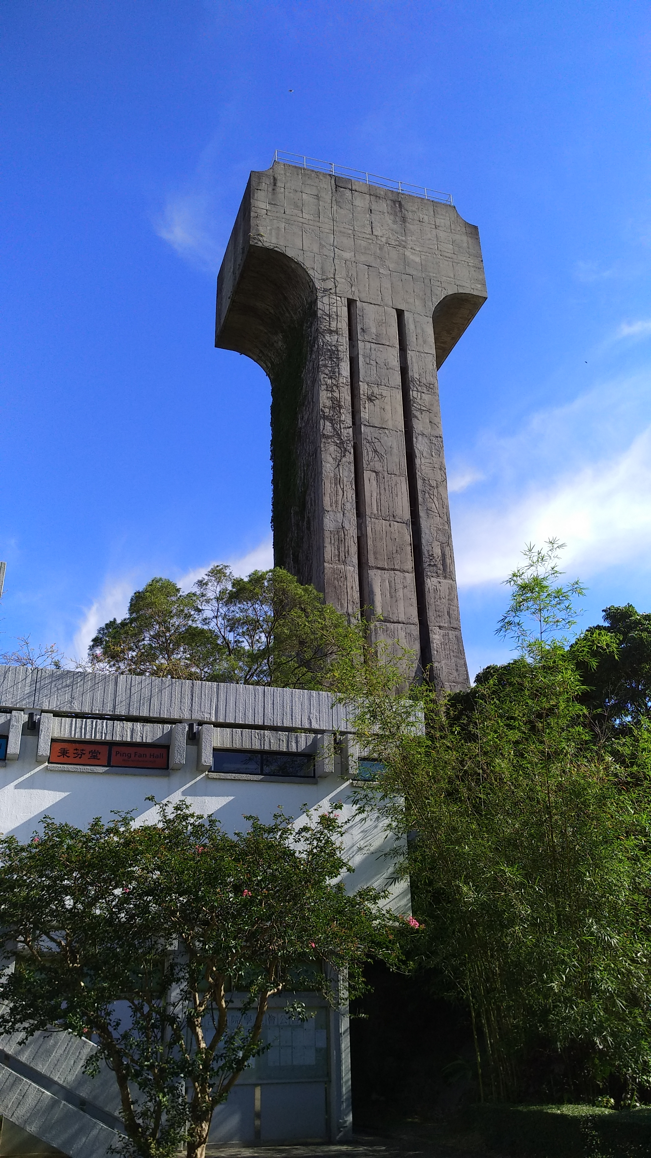 聯合書院水塔